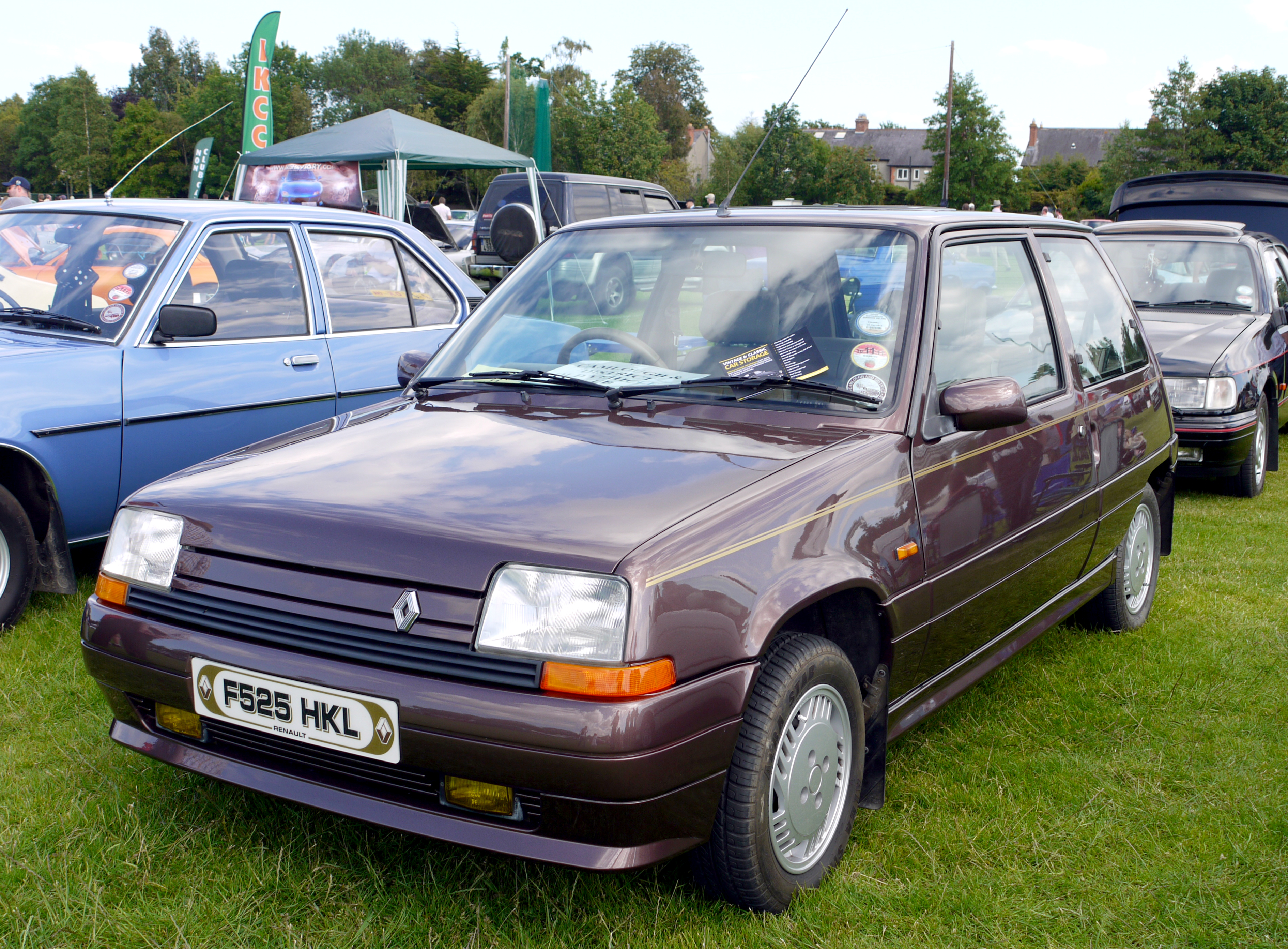 1988 Renault 5 Monaco automatic.